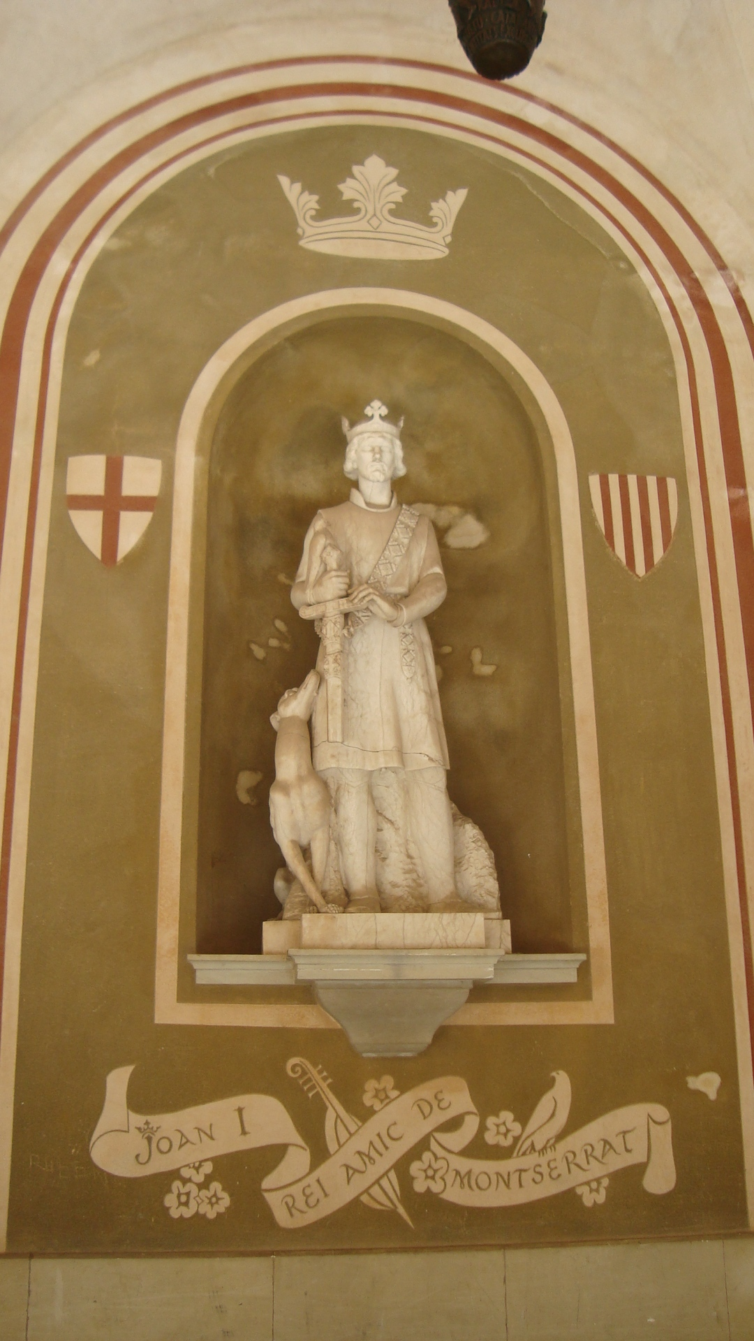 Monestir de Montserrat Monument real